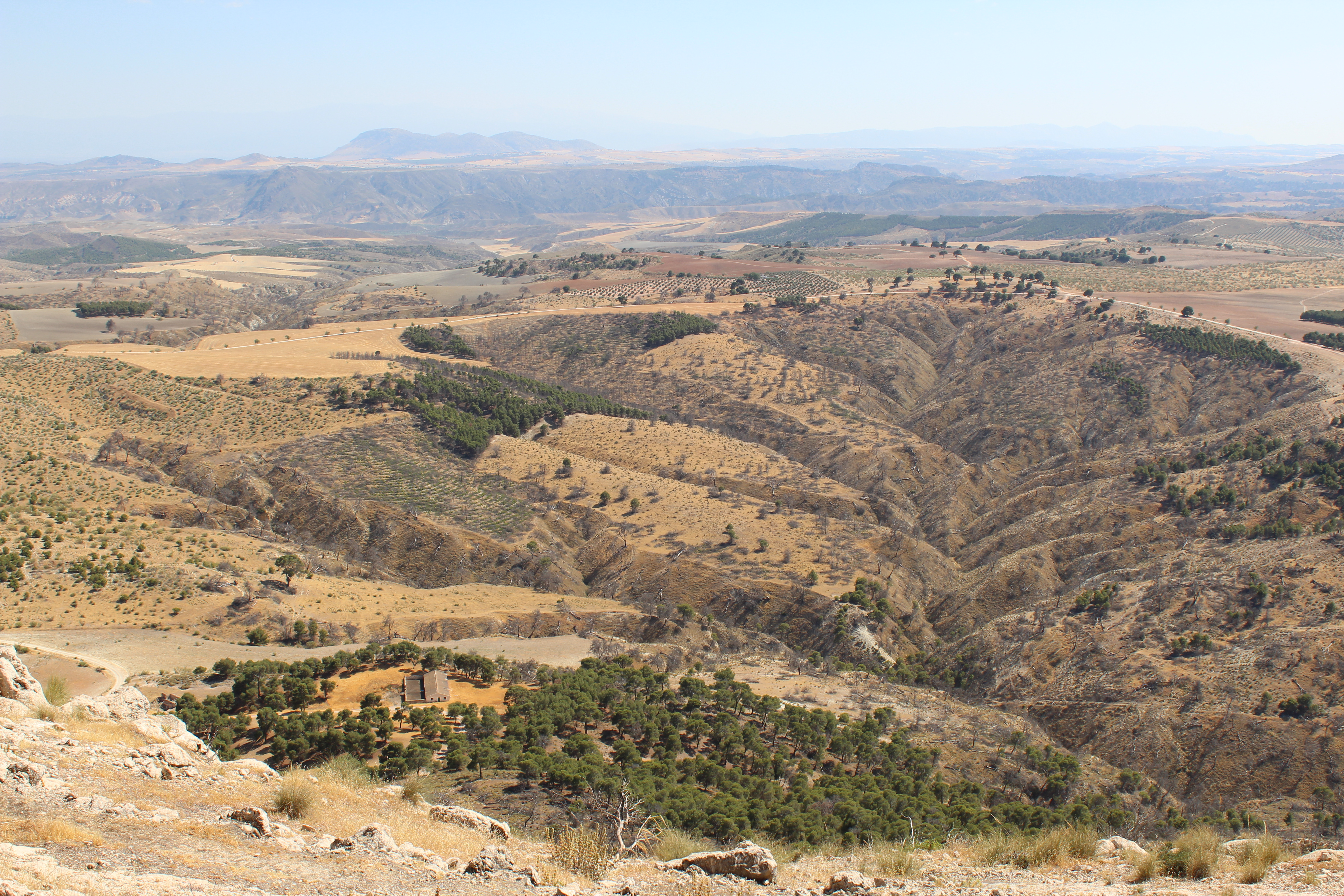 Vista del Corral de la Peña del Cambrón y de parte de la provincia de Granada.